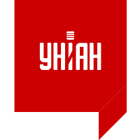 Логотип телеканалу з 2012 року.